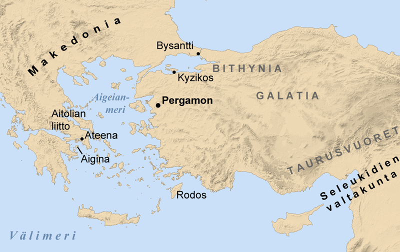 Pergamonin sijainti, tarkoitettu Attalos I -artikkeliin.